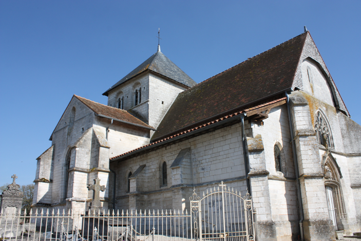 Église de la Nativité-de-la-Sainte-Vierge d'Humbauville (Classé) .